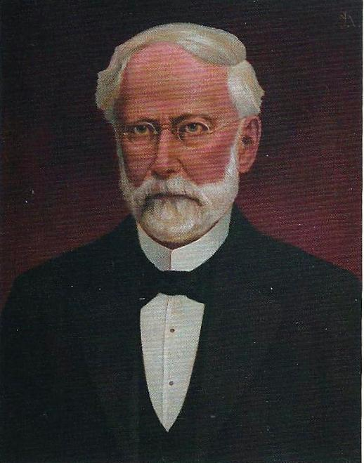 Scan eines Porträtgemäldes von Leopold Scheibler